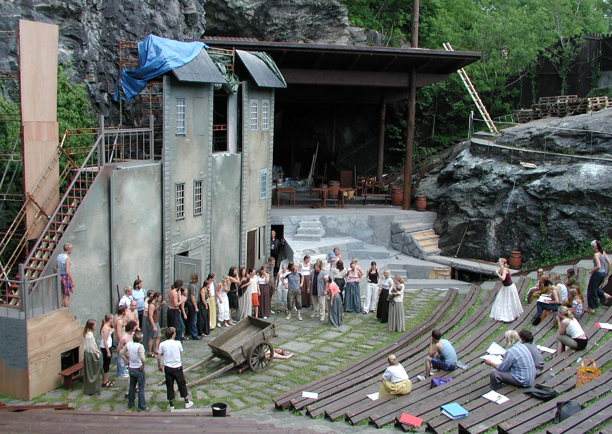 Prøver Les Misérables og oppbygging scene Moster Amfi